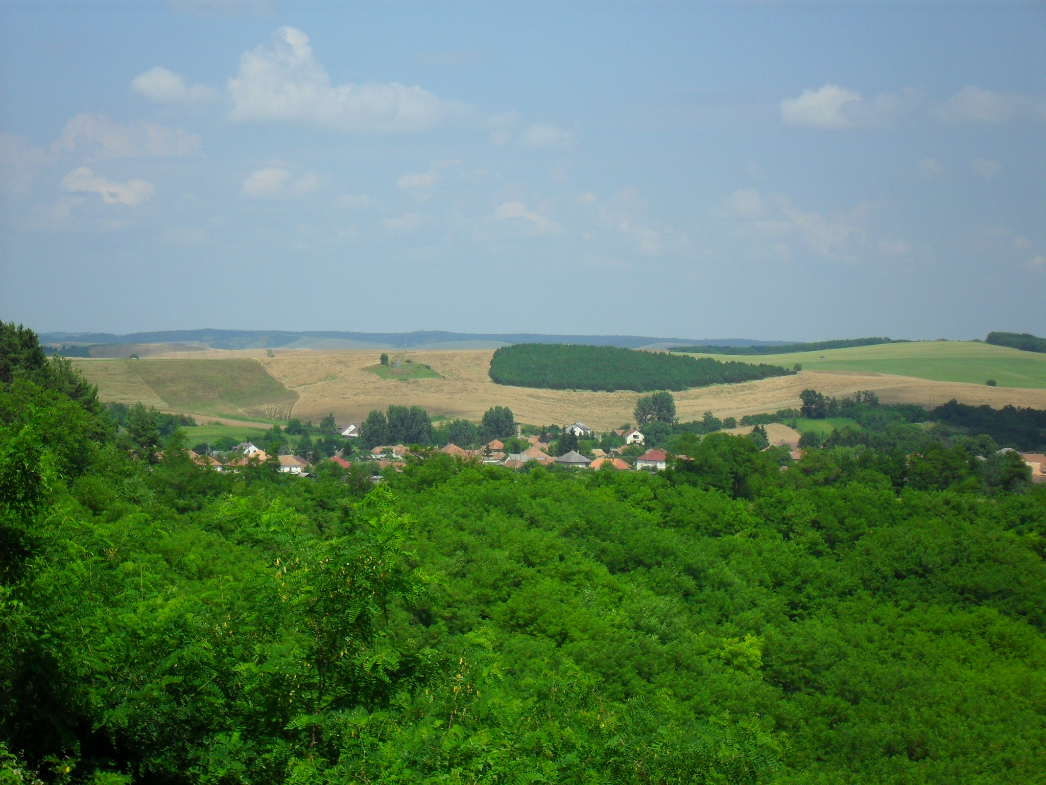 Cered - a falu látképe nyugat felől (a Salgótarján-Cered útról)